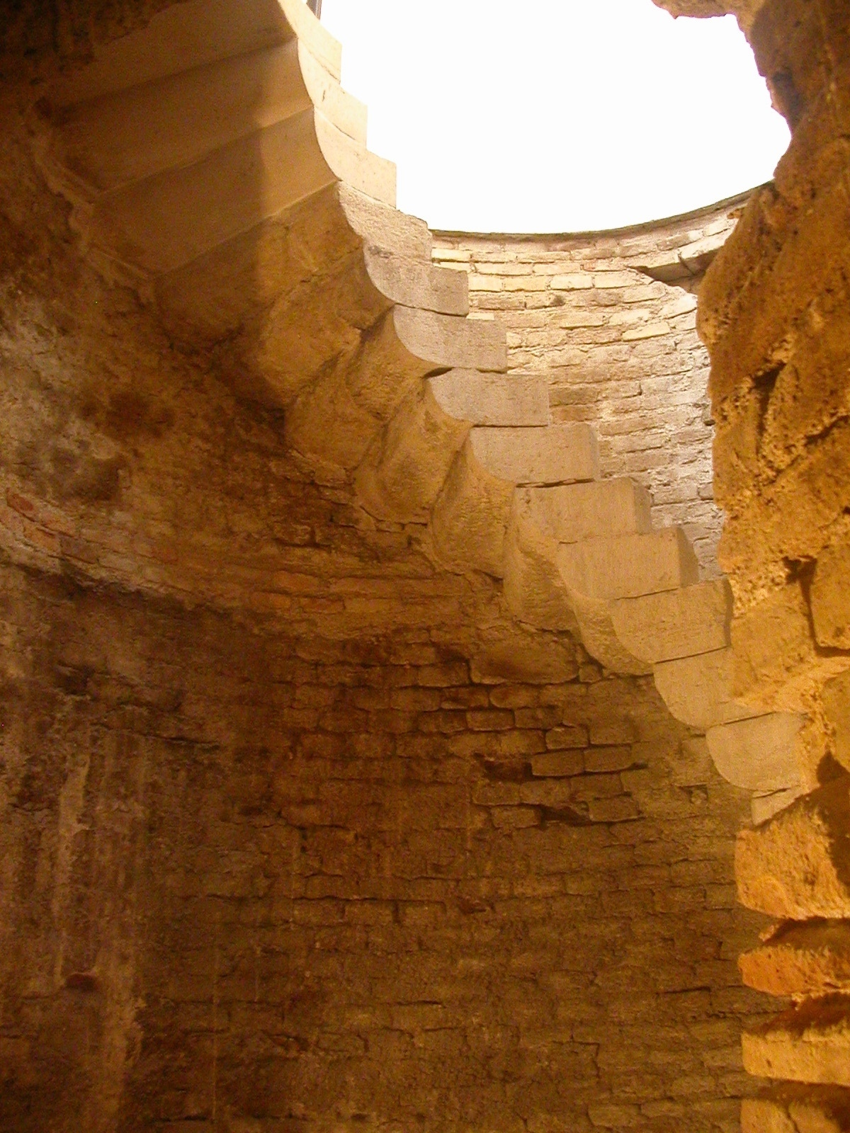 Senigallia - Rocca Roveresca - Scala a chiocciola interna